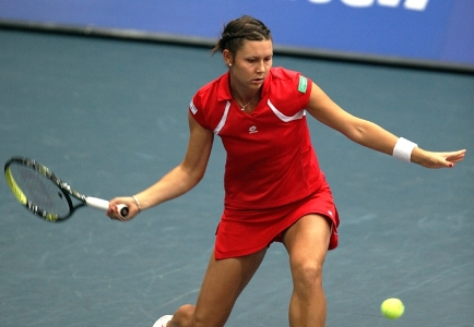 Klaudia Jans